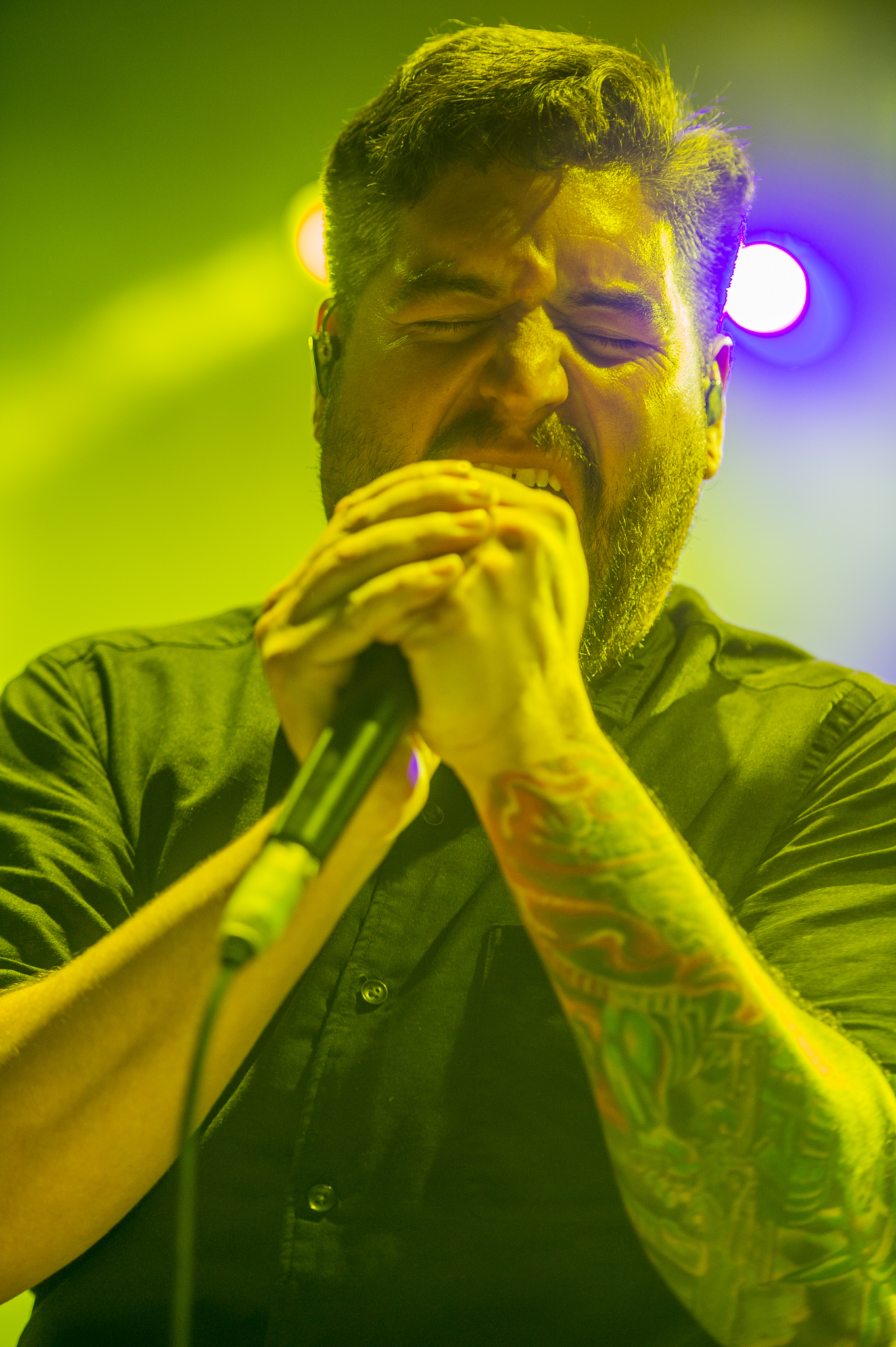 ARGO-Konzerte,Arena Nürnberger Versicherungen,Clubstage,Hernan "Eddie" Hermida,Konzert,Livekonzert,Livemusik,Musik,RiP,Rock im Park 2014,Suicide Silence